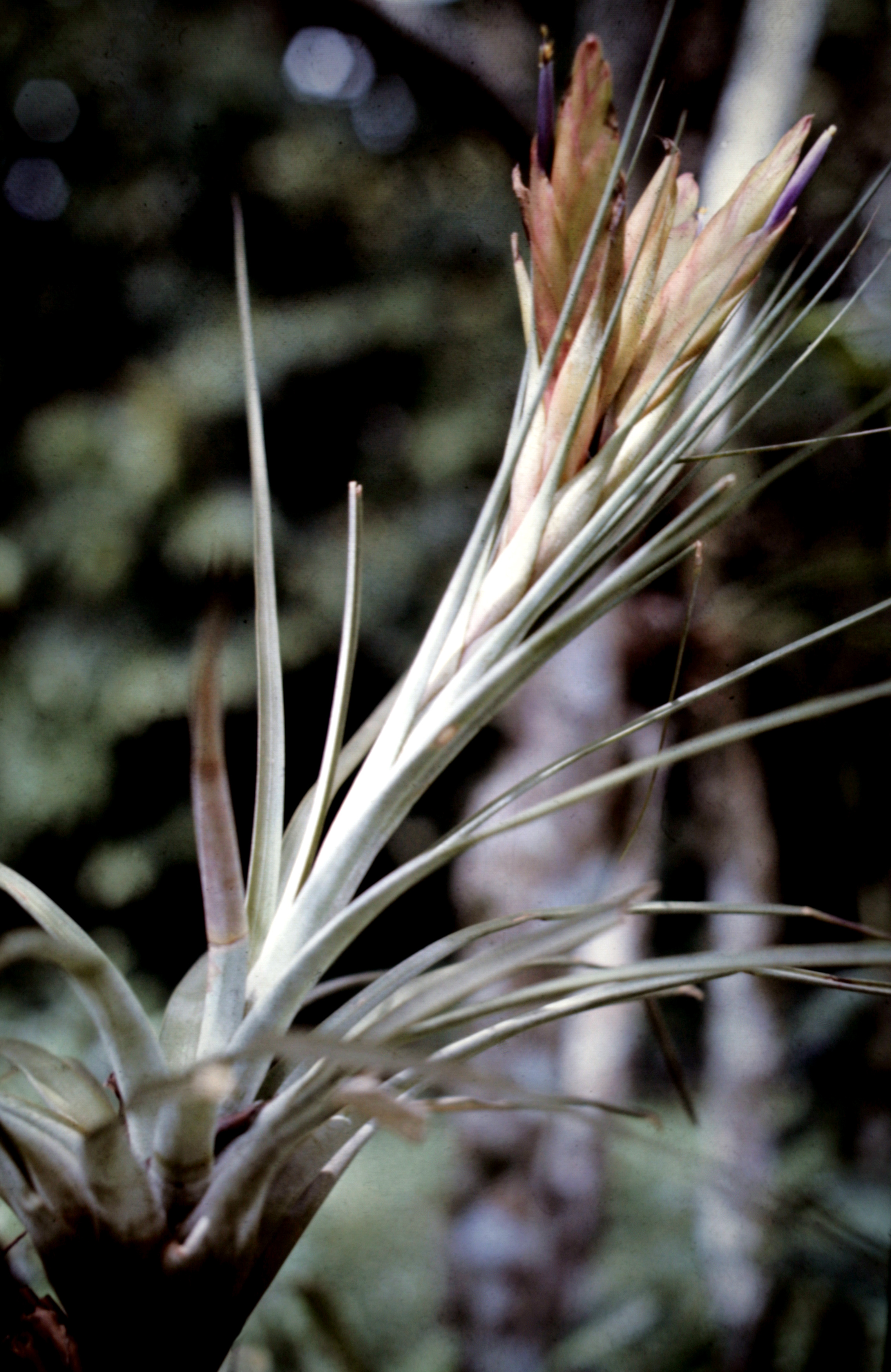 Tillandsia fasciculata, Suriname